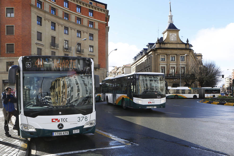 Villavesas en la Plaza de las Merindades de Navarrra